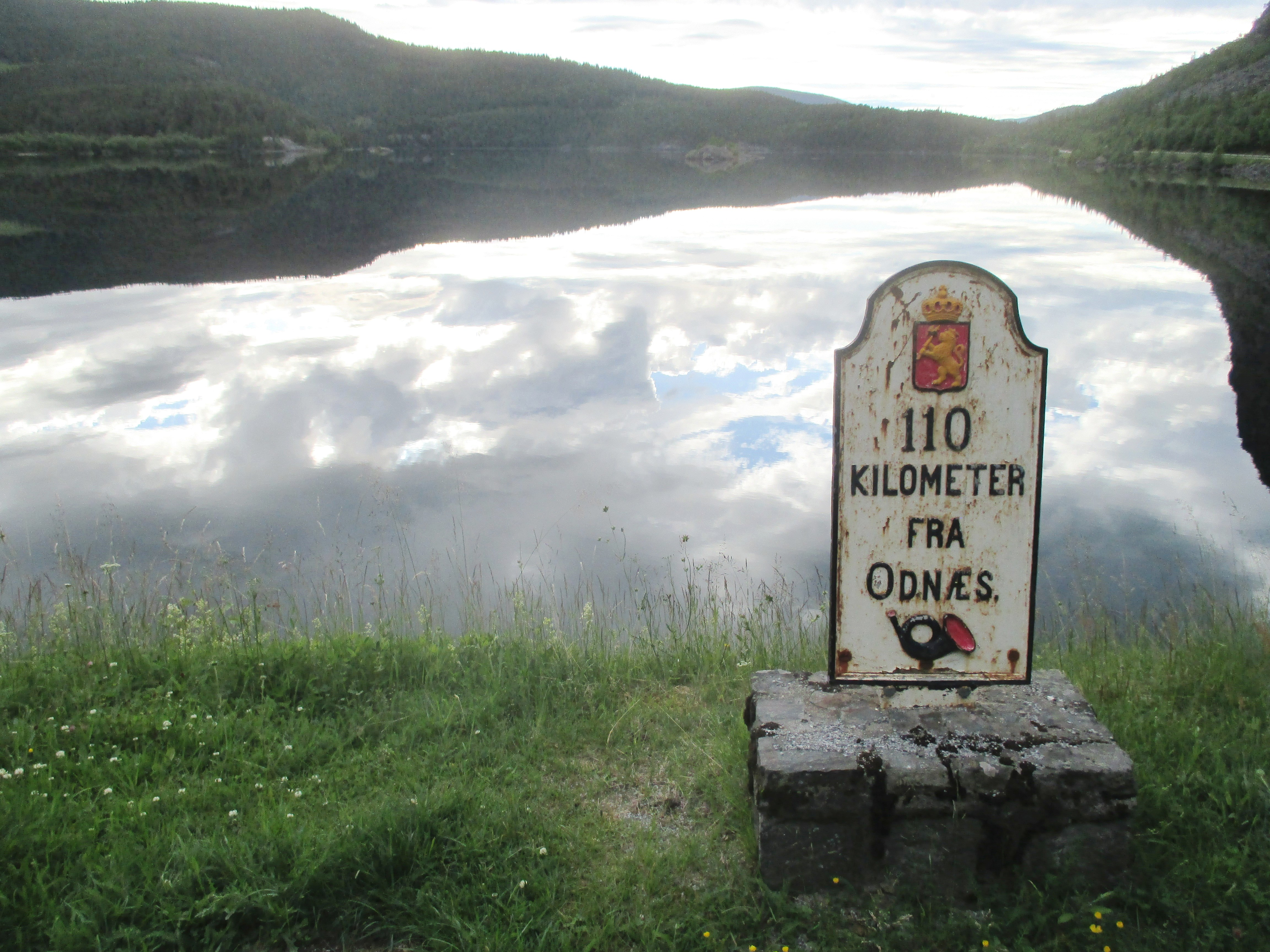 Langs Milesteinsvegen ved Hugavika (eller Hugavike) i Norsvinsfjorden